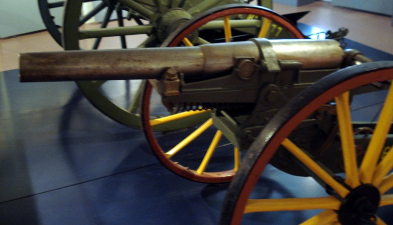 63 mm Baranovsky gun